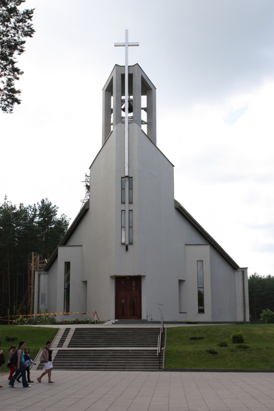 Visagino šv. apaštalo Pauliaus bažnyčia.